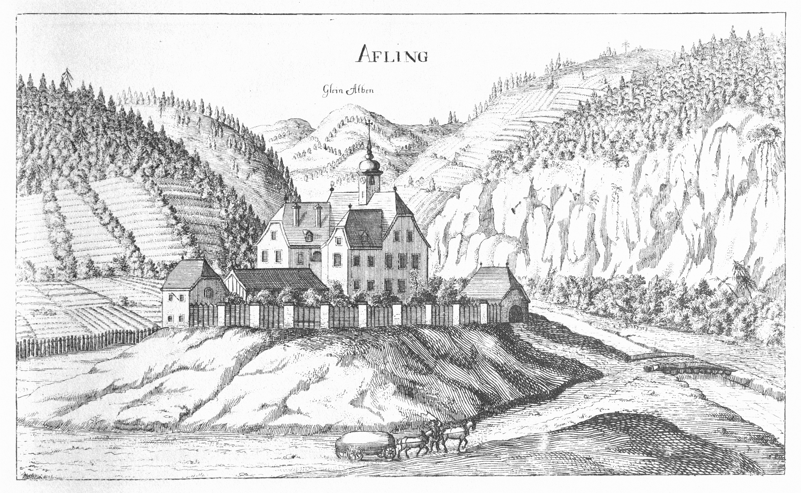 G. M. Vischers Käyserlichen Geographi, Topographia Ducatus Stiriae, Das ist: Eigentliche Delineation / und Abbildung aller Städte / Schlösser / Marcktfleck / Lustgärten / Probsteyen / Stiffter / Clöster und Kirchen / so es sich im Herzogthumb Steyrmarck befinden; Und anjetzo Umb einen billichen Preyß zu finden seynd Bey Johann Bitsch Universitäts Buchhandlern / Auff dem Juden=Platz bey der guldenen Saulen. Graz 1681